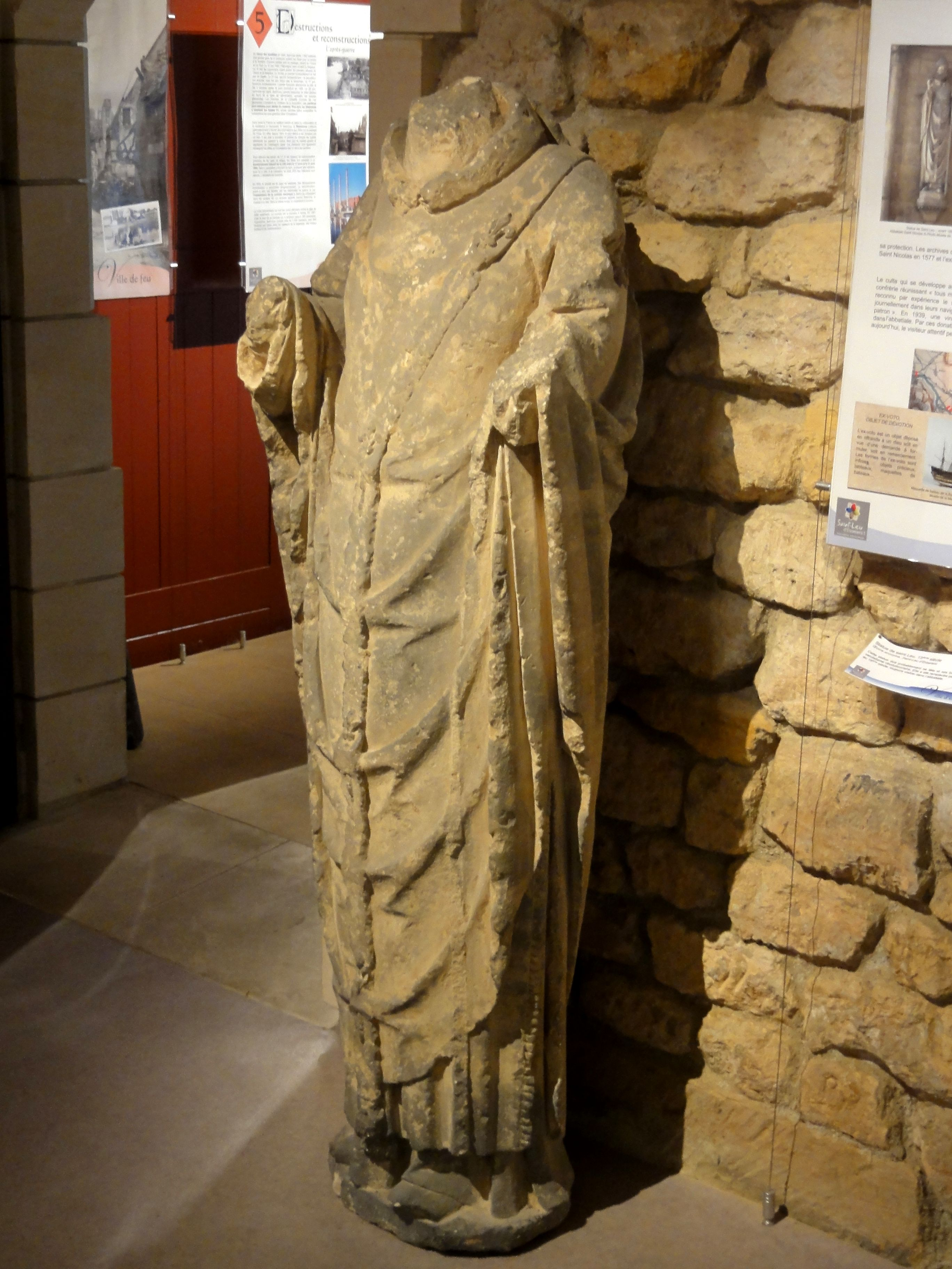 Statue de saint Leu de Sens du XIIIe siècle, mutilée à la Révolution. Exposée au musée de la Guesdière.